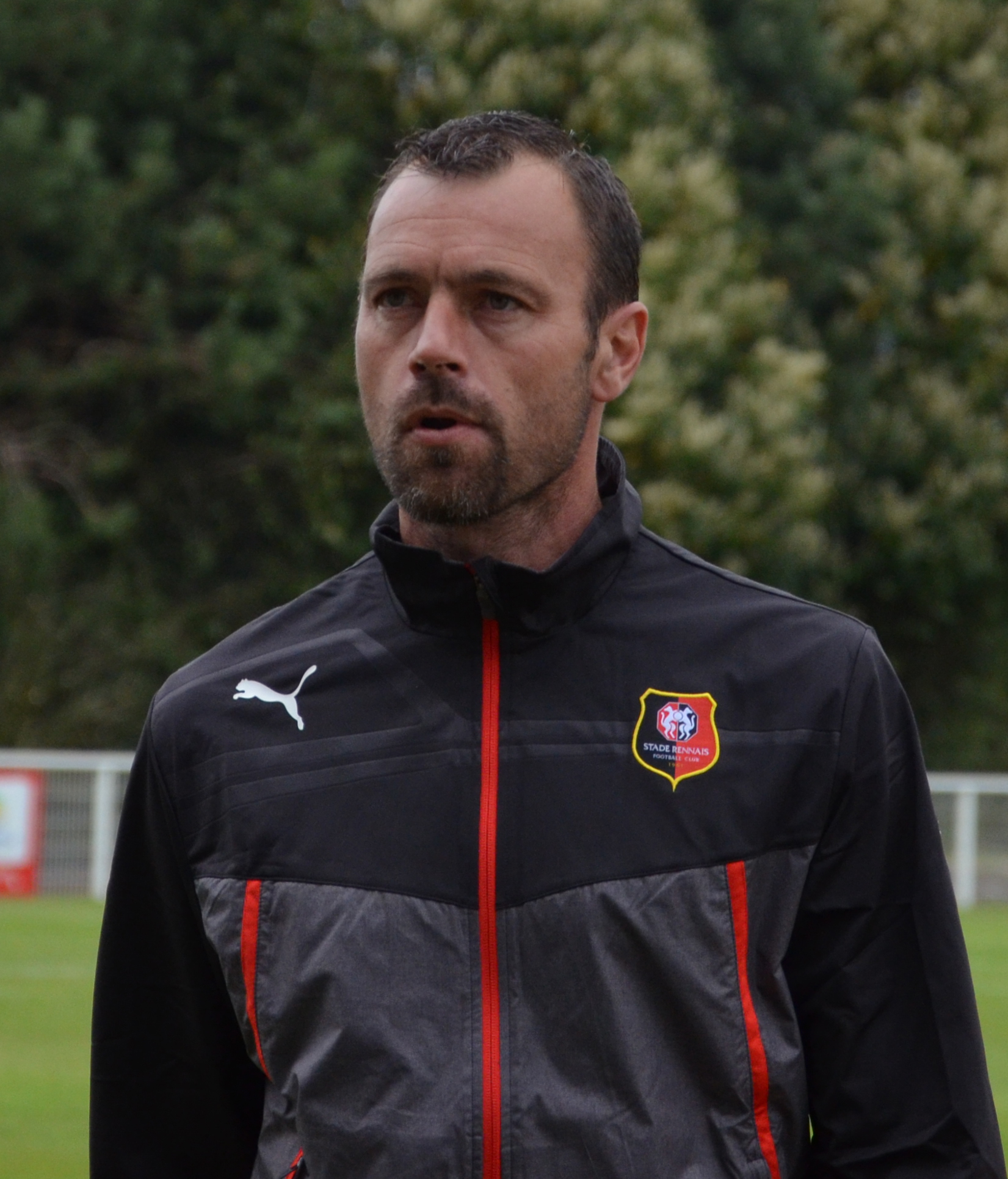 Photo prise lors du match de Championnat de France amateur 2 de football opposant le FC Saint-Lô au Stade rennais. Ici, Mickaël Pagis, entraîneur adjoint de la réserve du Stade rennais.